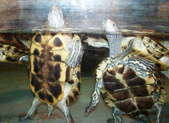 черепашки в акванариуме бакинского зоопарка